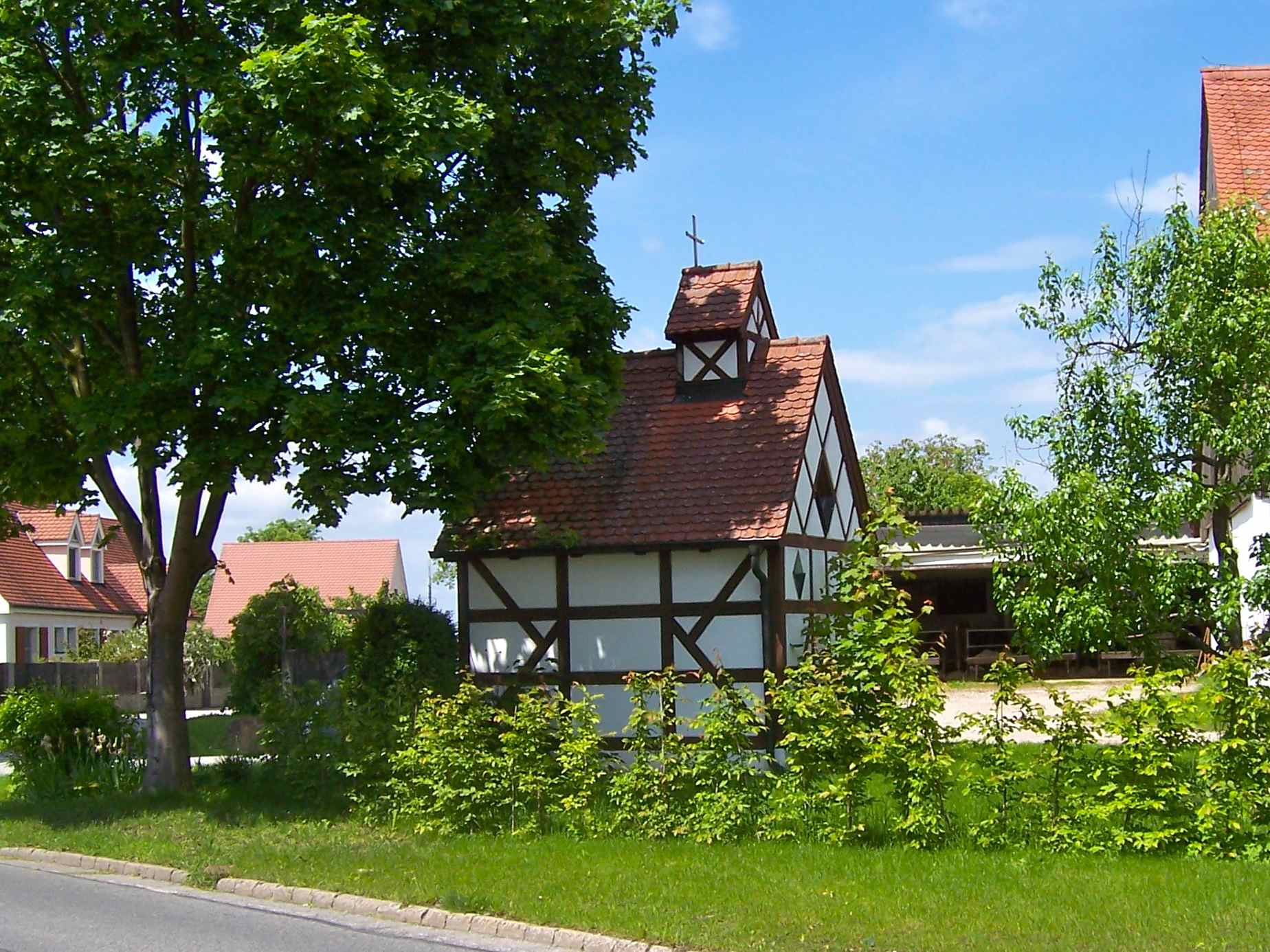 Selingstadt_Kapelle